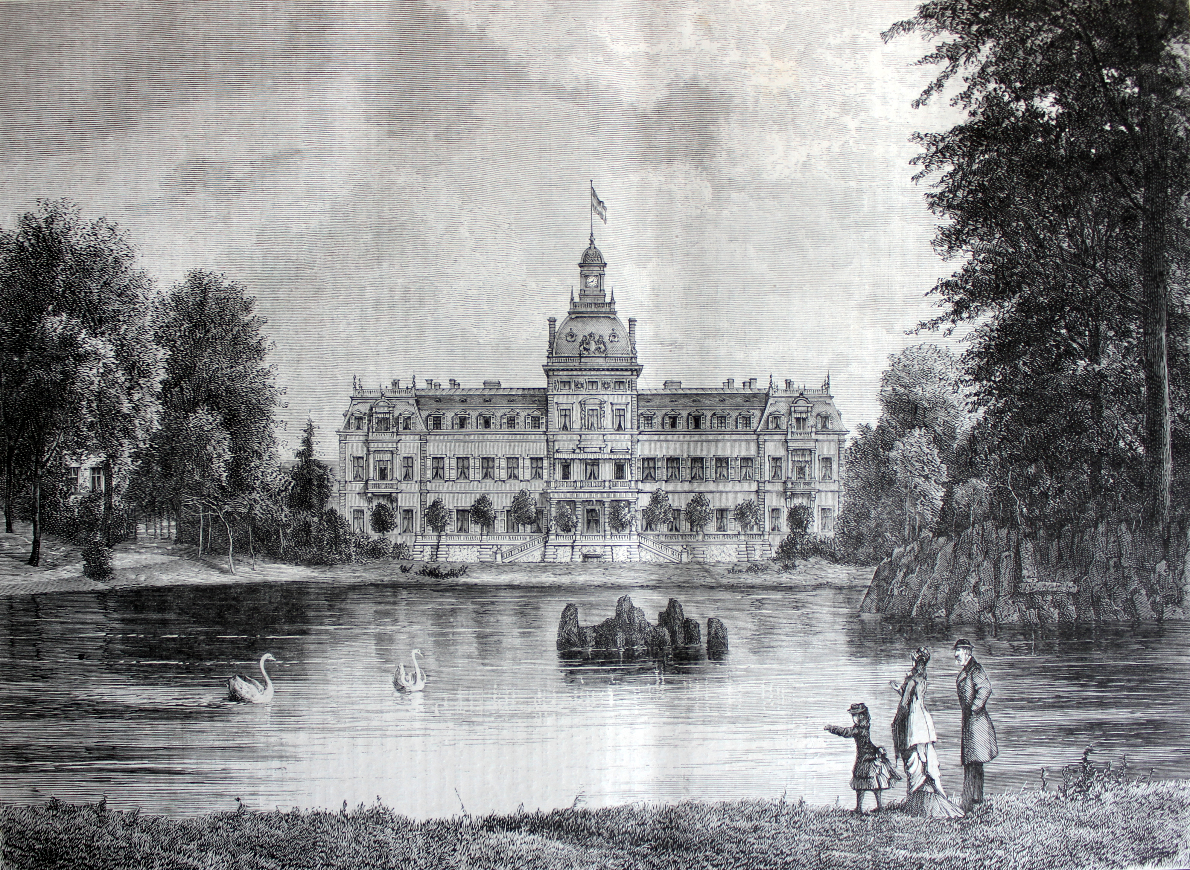 Fra Illustreret Tidende den 31. oktober 1880. Original billedtekst: Hs. Kgl. H. Landgreve Friedrich Wilhelm af Hessen-Cassels Slot Philipsruhe ved Hanau. Midtbygningens Parkfacade.